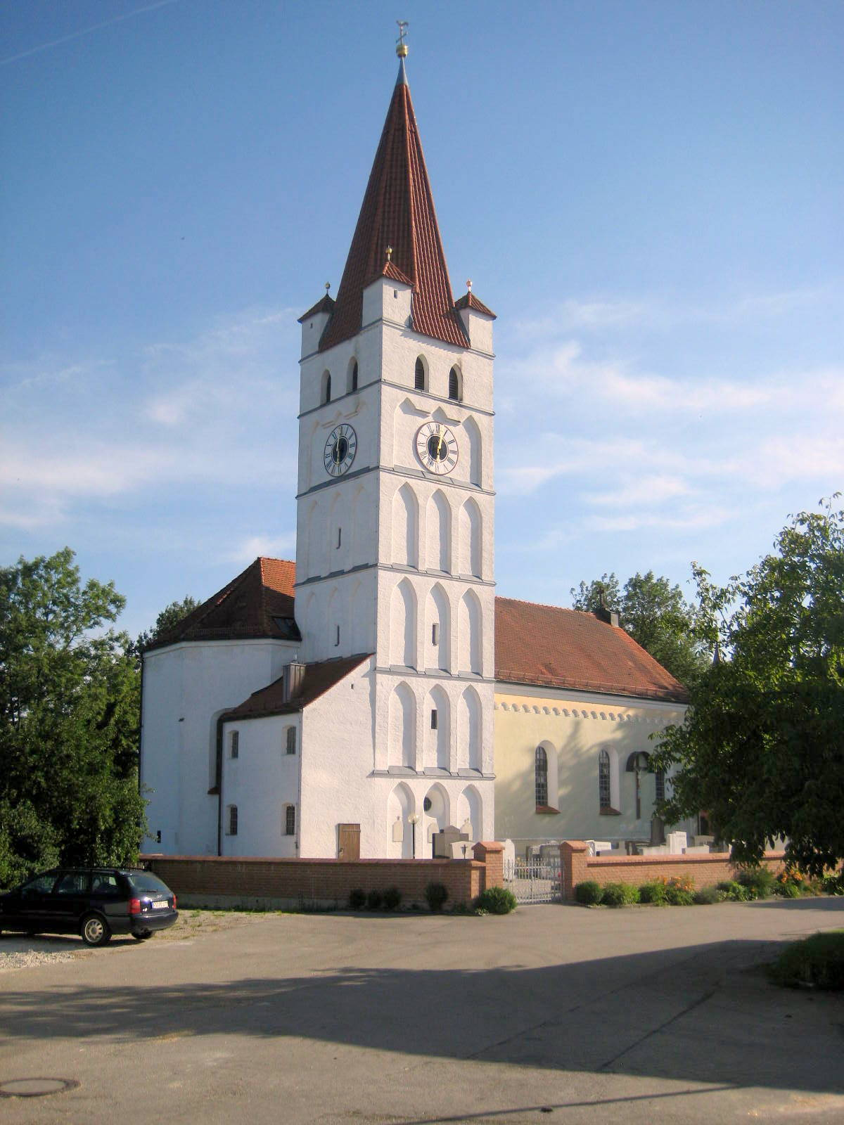 Der alte Turm der Kirche wirkt fast wie ein Schlossturm.